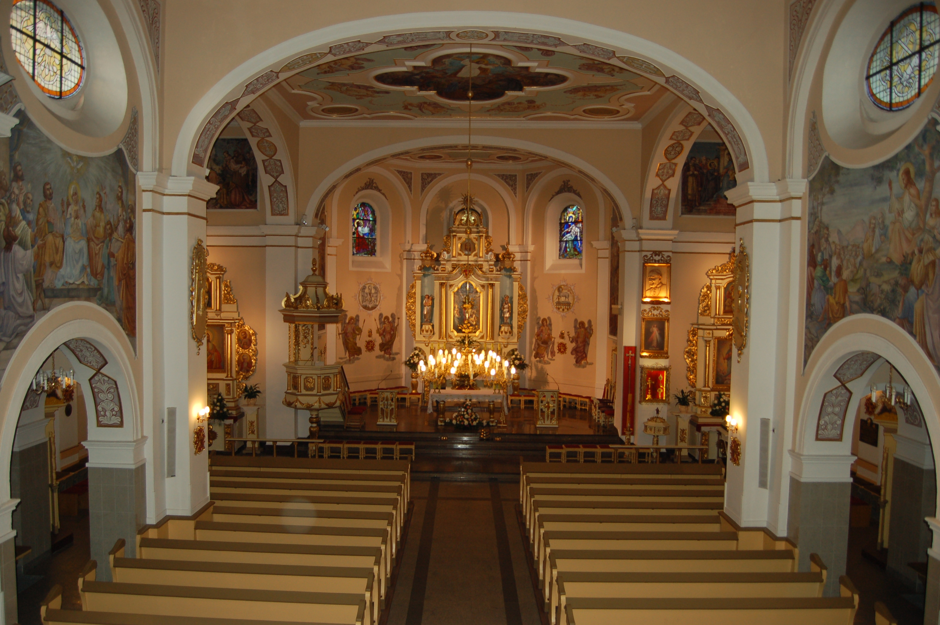 Widok z chóru w kościele św. Krzyża w Rumi